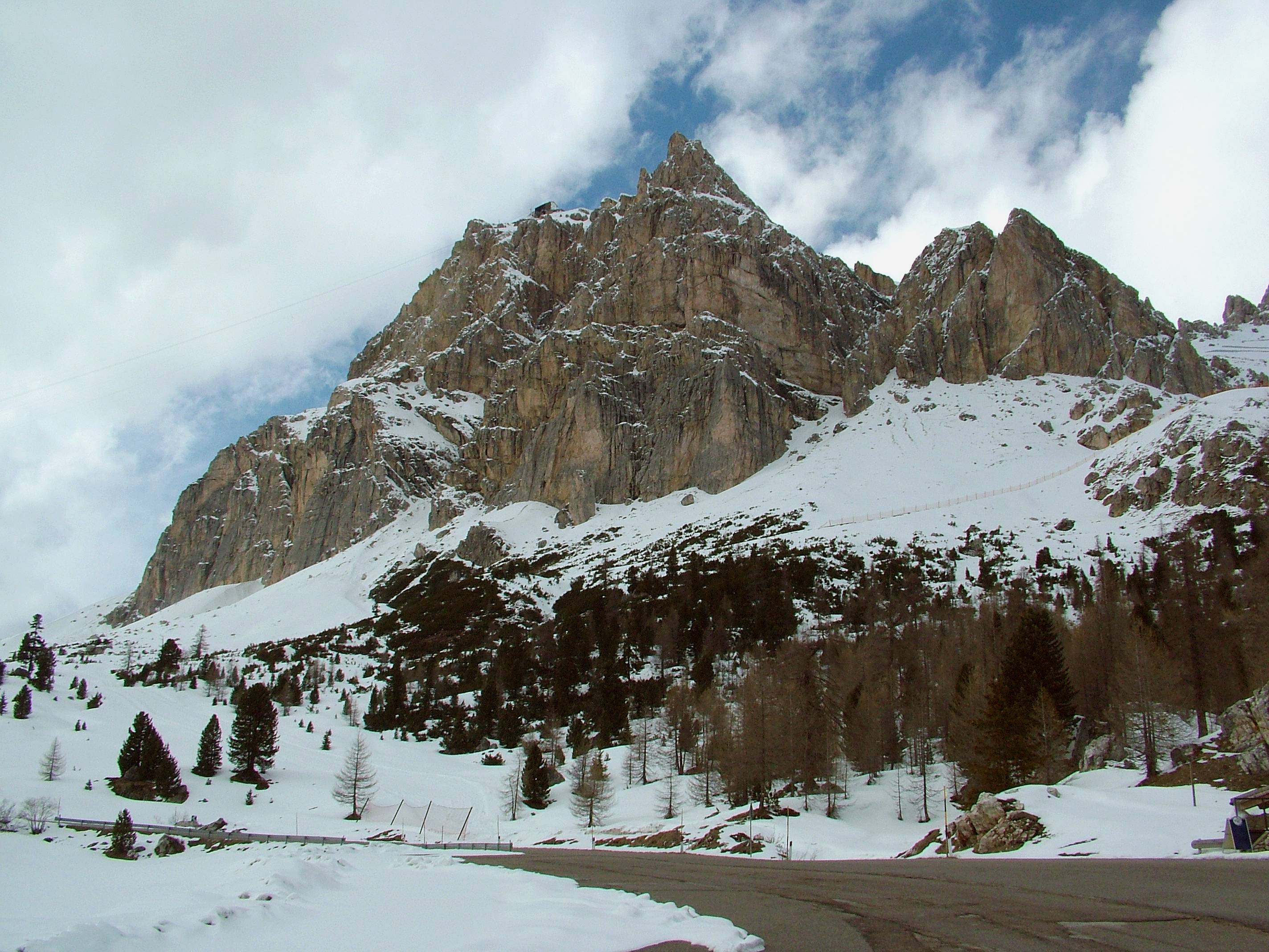 Falzarego-hágó, Olaszország